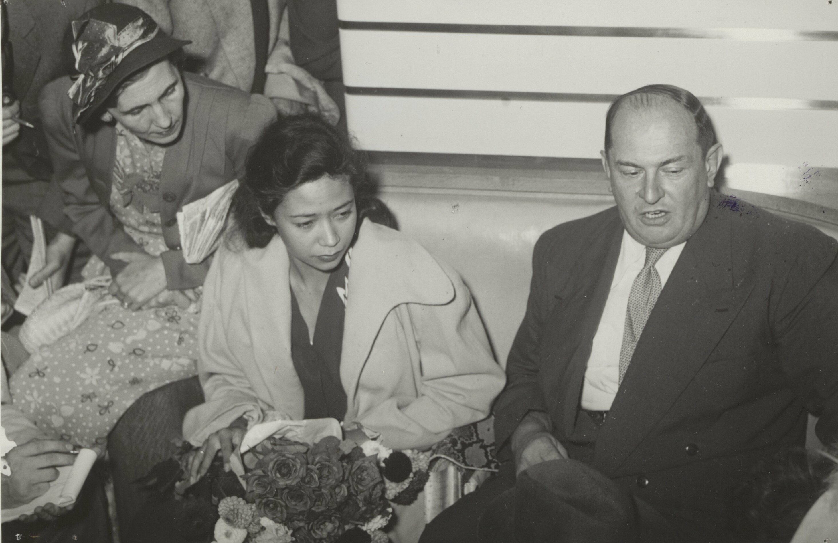 Collectie / Archief : Fotocollectie Elsevier Reportage / Serie : [ onbekend ] Beschrijving : Hedenavond arriveerde op Schiphol mevrouw Westerling (Fernande Yvonne Fournier). Zij gaf direct na aankomst een persconferentie. Naast mevrouw Westerling de heer Thiessen Annotatie : Fernande Fournier was de tweede echtgenote van Westerling. Thiessen had Westerling geholpen uit Indonesië te ontsnappen Datum : 24 augustus 1950 Locatie : Noord-Holland, Schiphol Trefwoorden : aankomsten, persconferenties, vliegvelden, vrouwen Persoonsnaam : Thiessen, John, Westerling-Fournier, Fernande Fotograaf : Bilsen, Joop van / Anefo, [onbekend] Auteursrechthebbende : Nationaal Archief Materiaalsoort : Foto (zwart/wit) Nummer archiefinventaris : bekijk toegang 2.24.05.02 Bestanddeelnummer : 145-0742